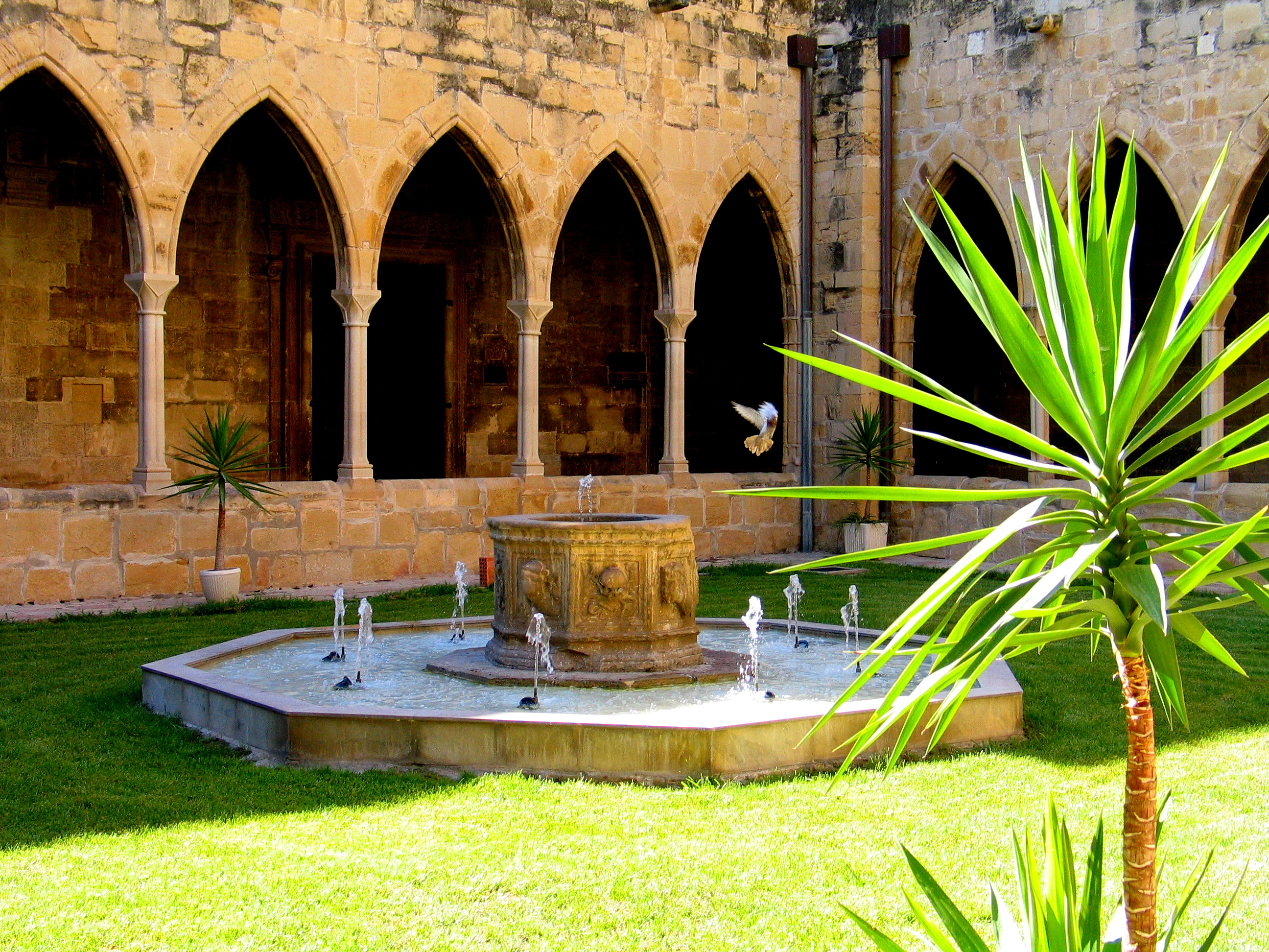 Claustre de la catedral de Tortosa